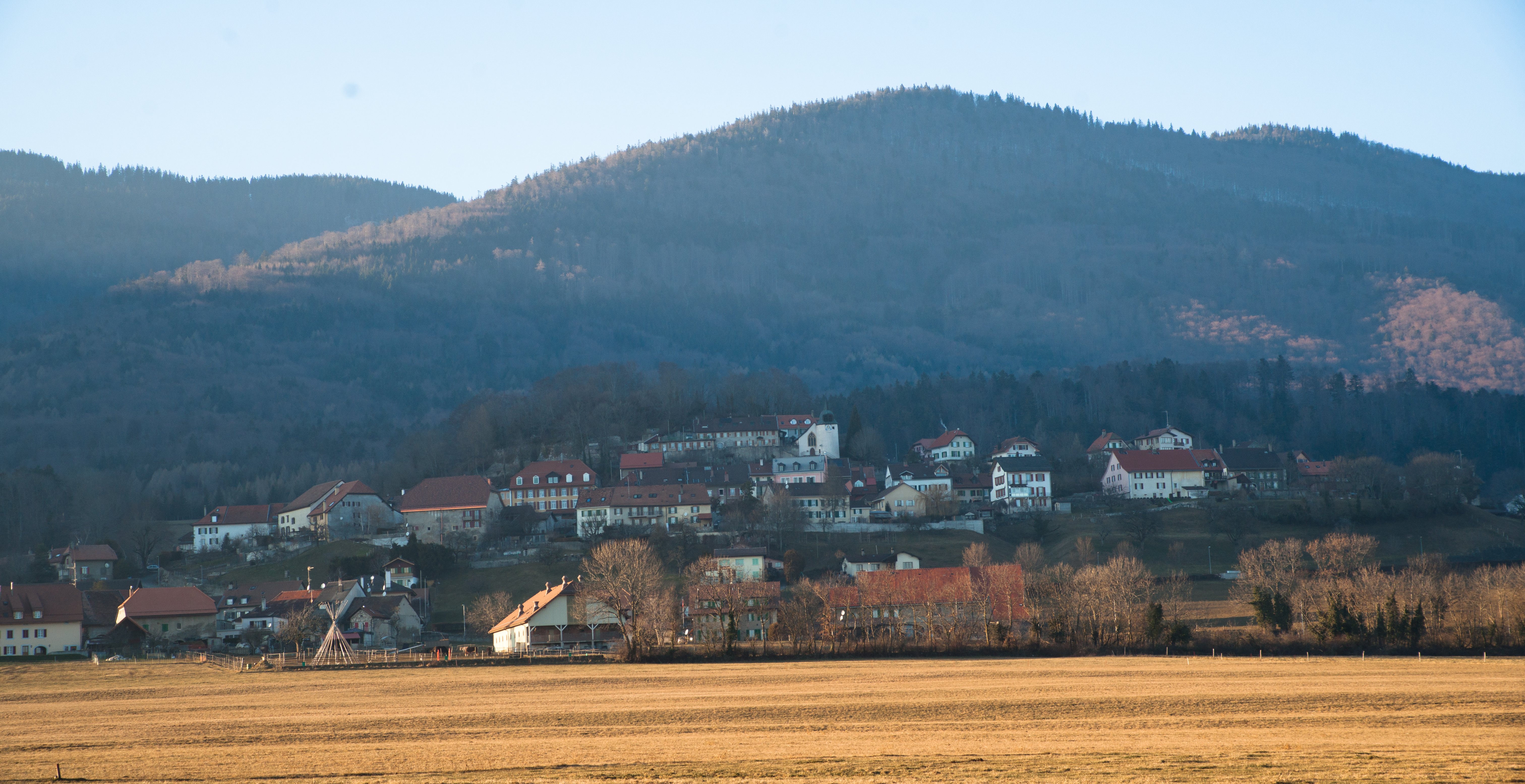 Montricher, canton de Vaud, Suisse.